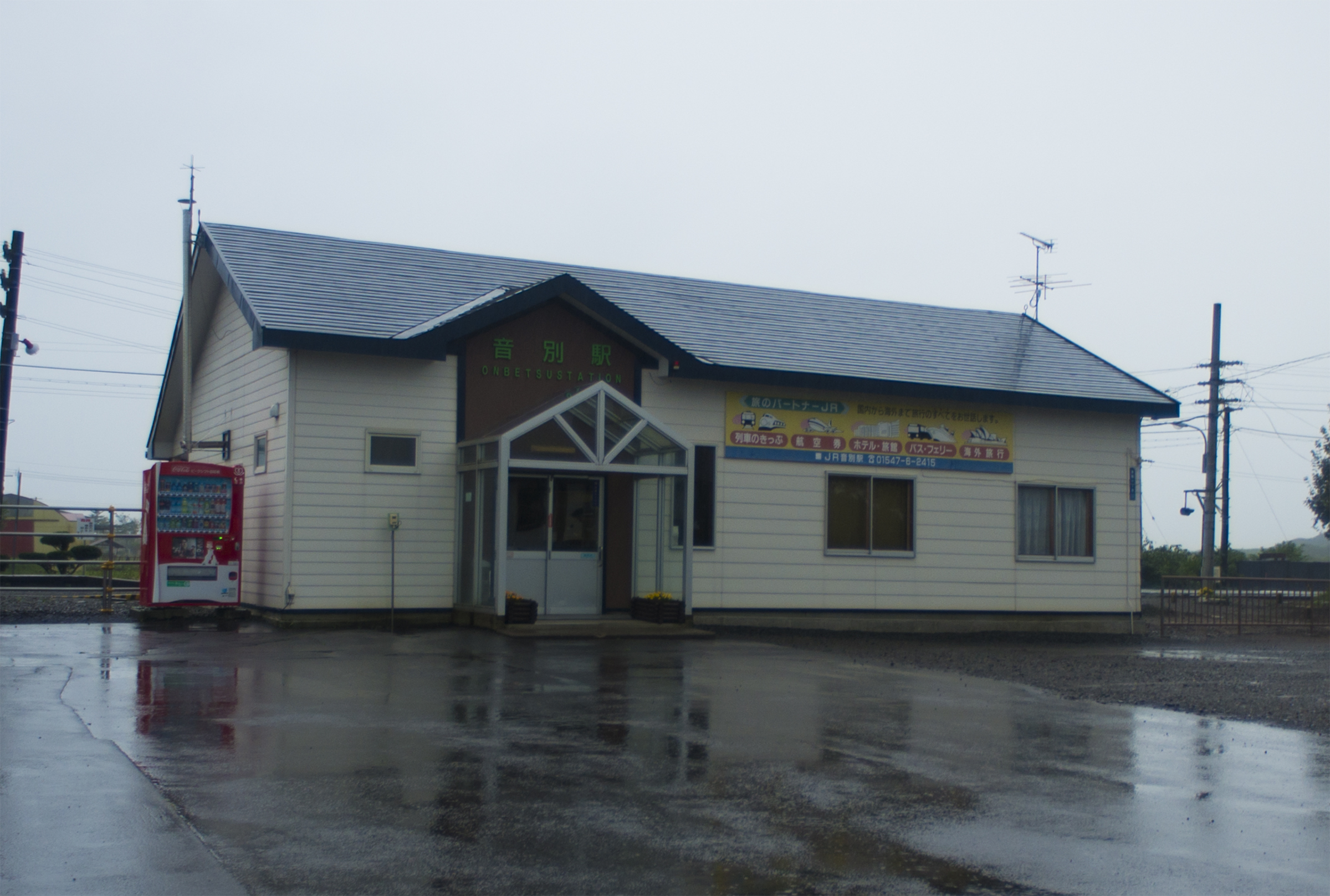 北海道旅客鉄道根室本線音別駅駅舎